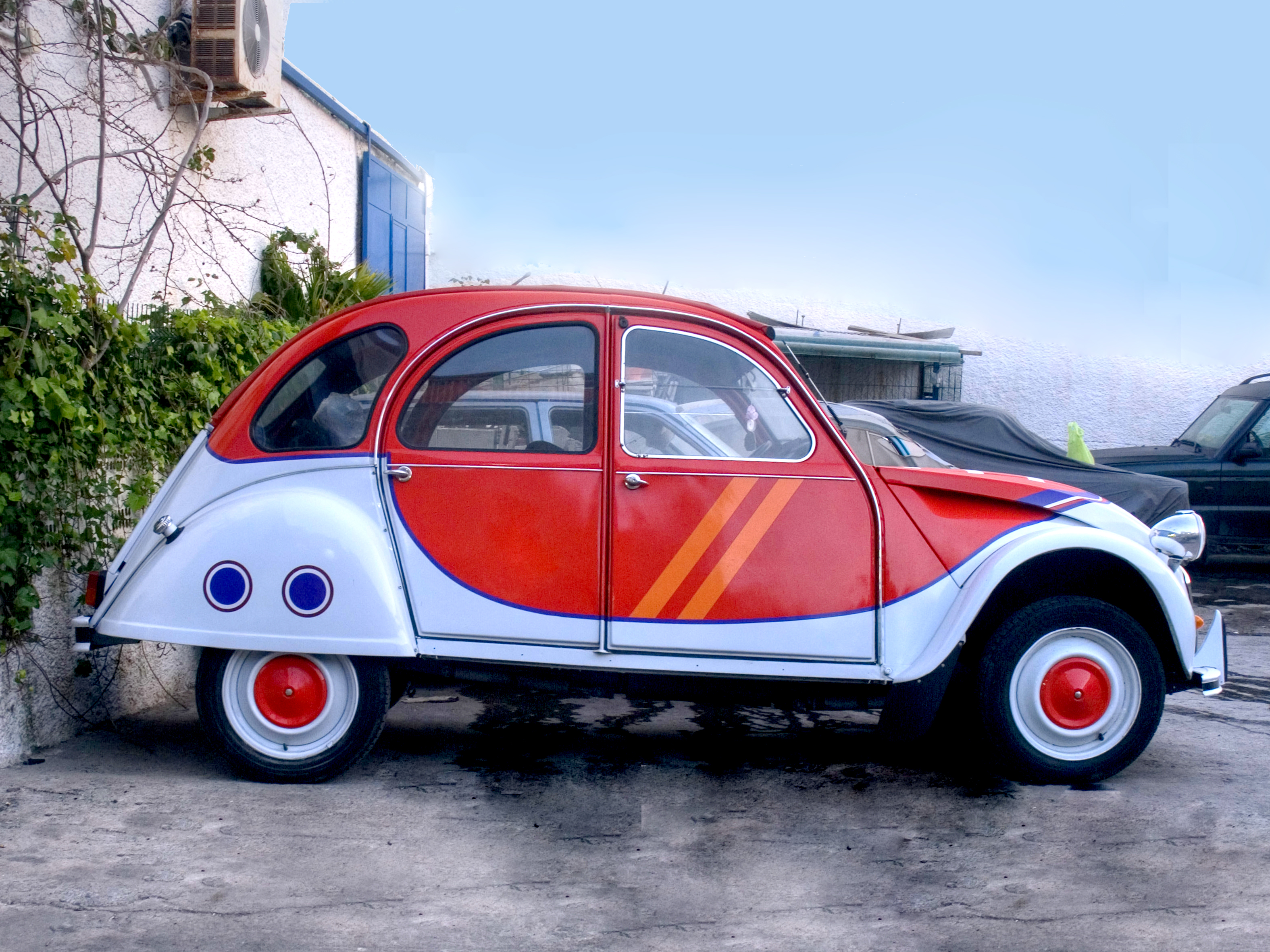 Museo Historia del Automóvil en Melilla Siglo XX, bueno, éste está en el garaje de al lado.